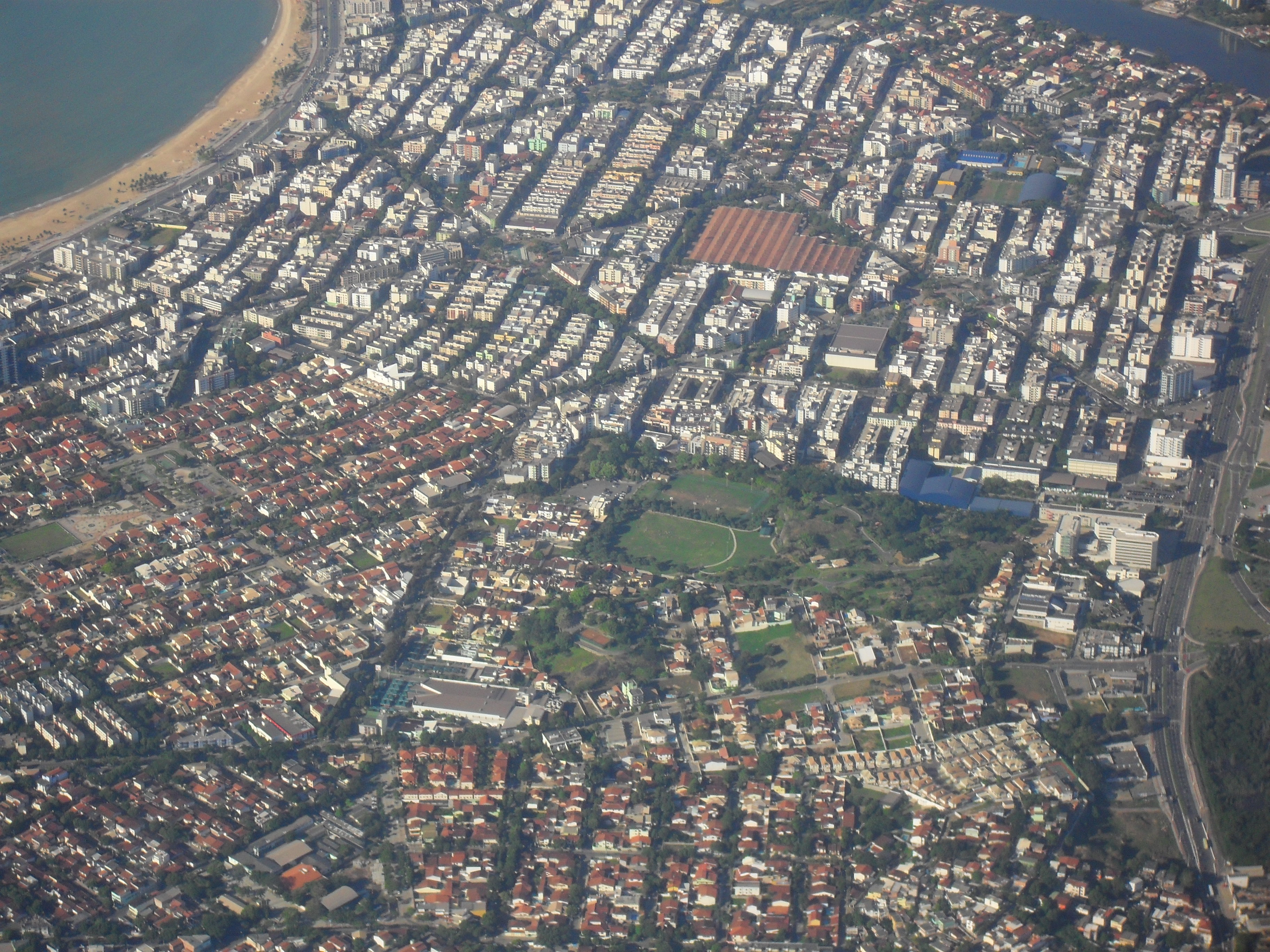 AMR-PRAIA DE CAMBURI VISTO A BORDO DE UM JATO DA GOL